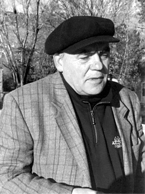 Fotografiju snimio Plamenic